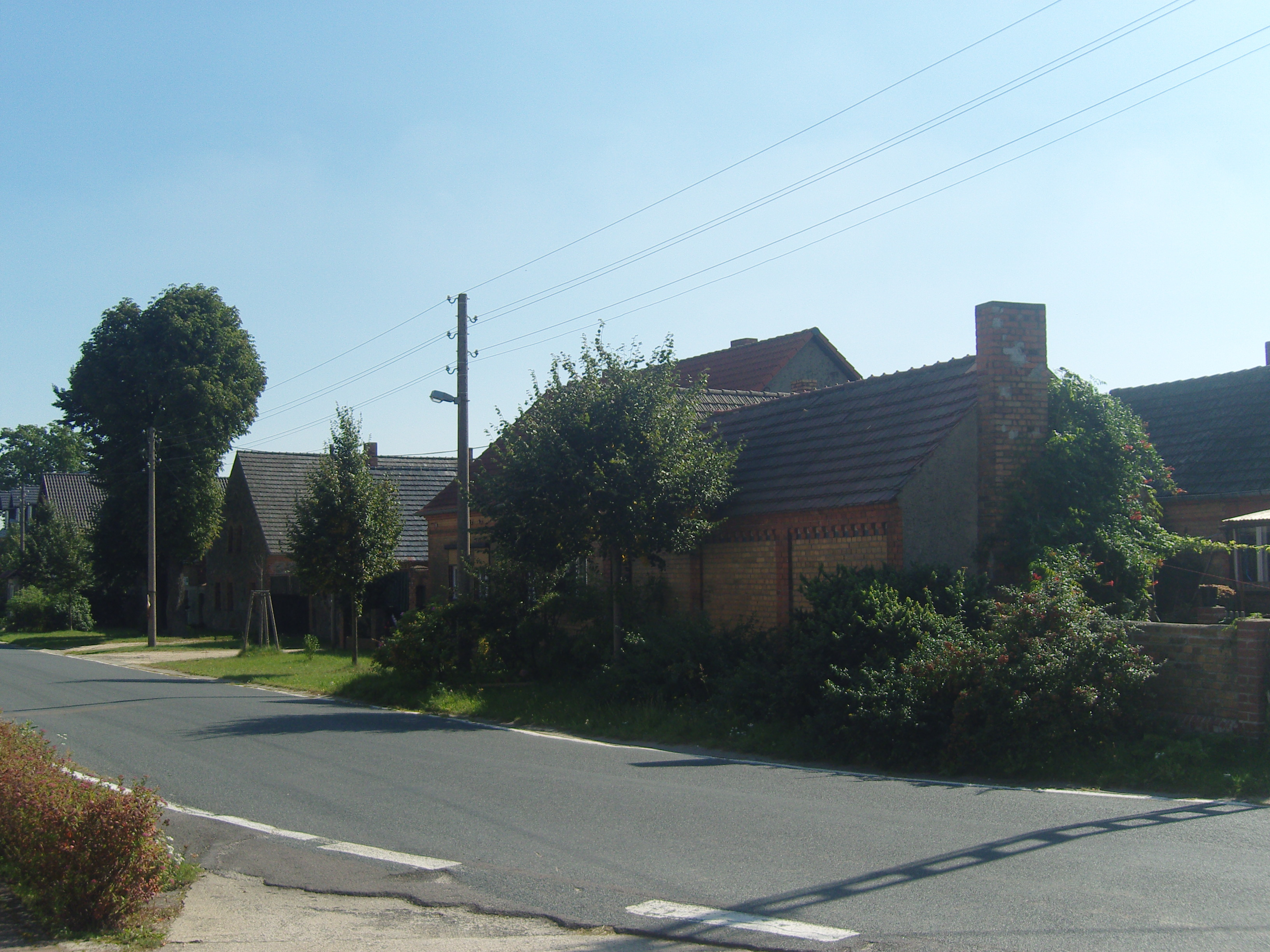 Straßenansicht in Gosda, Gemeinde Luckaitztal